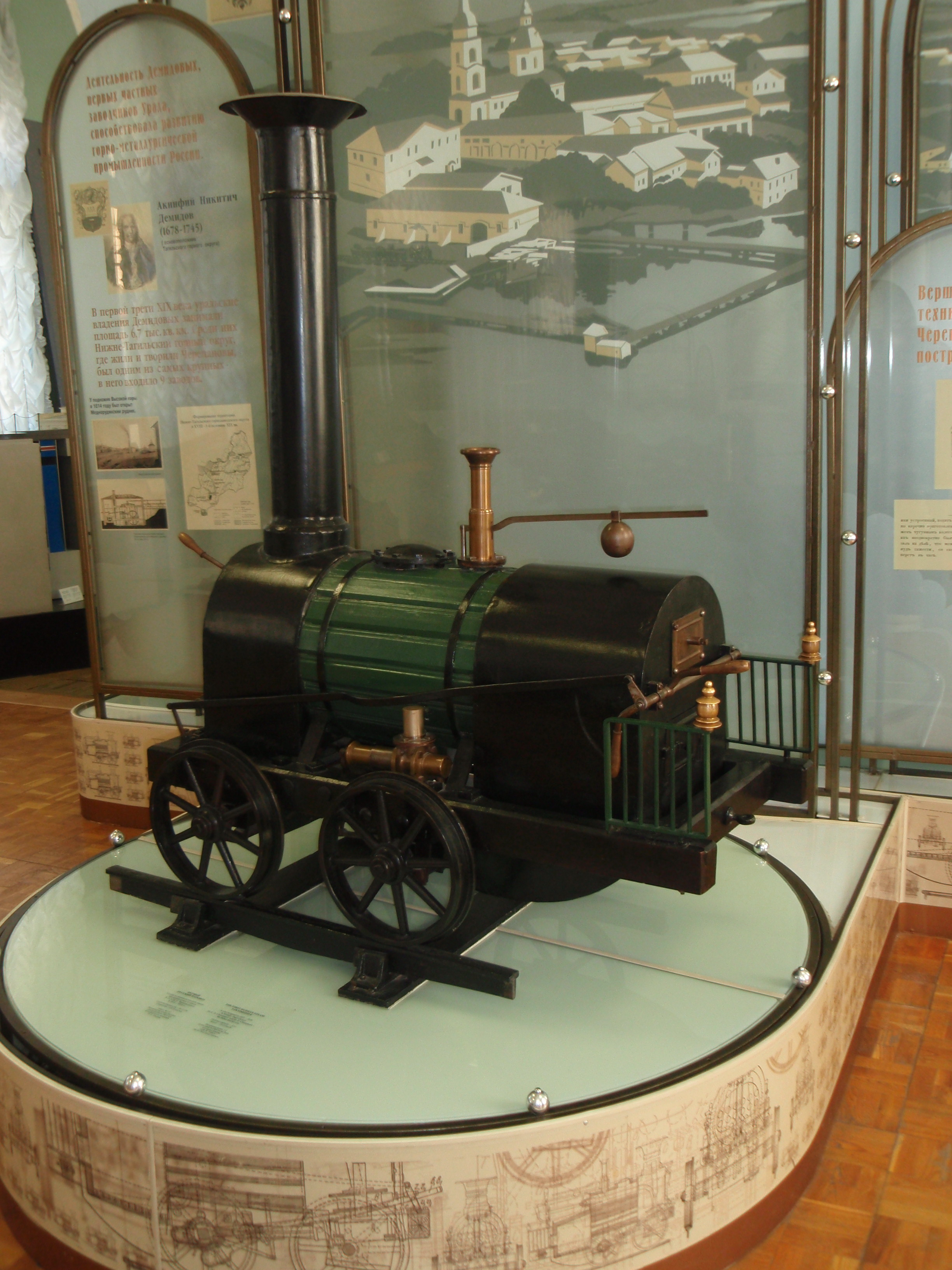 Паровоз Черепановых, Государственный Политехнический музей (г.Москва)